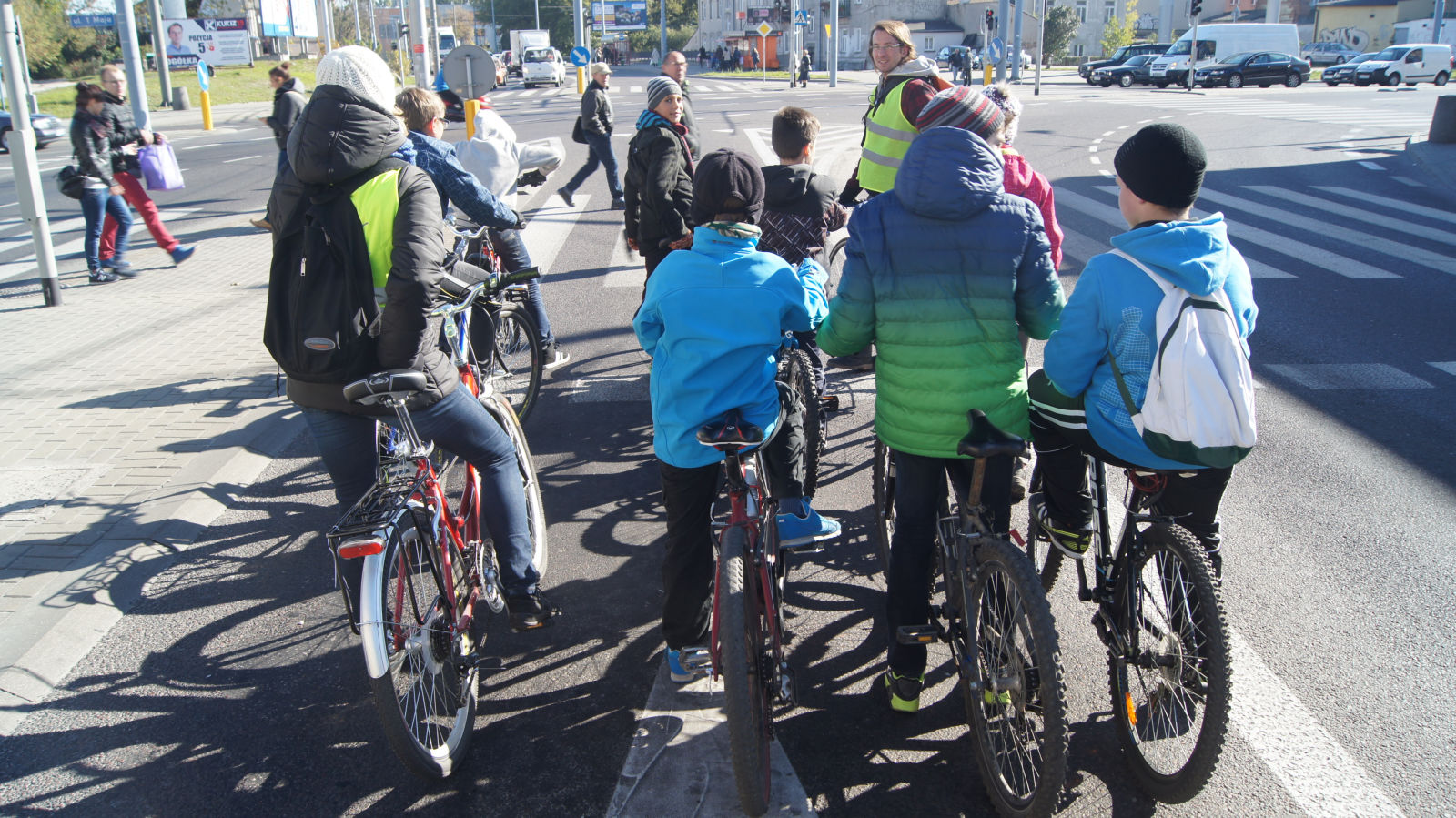 Szkolna praktyczna edukacja rowerowa